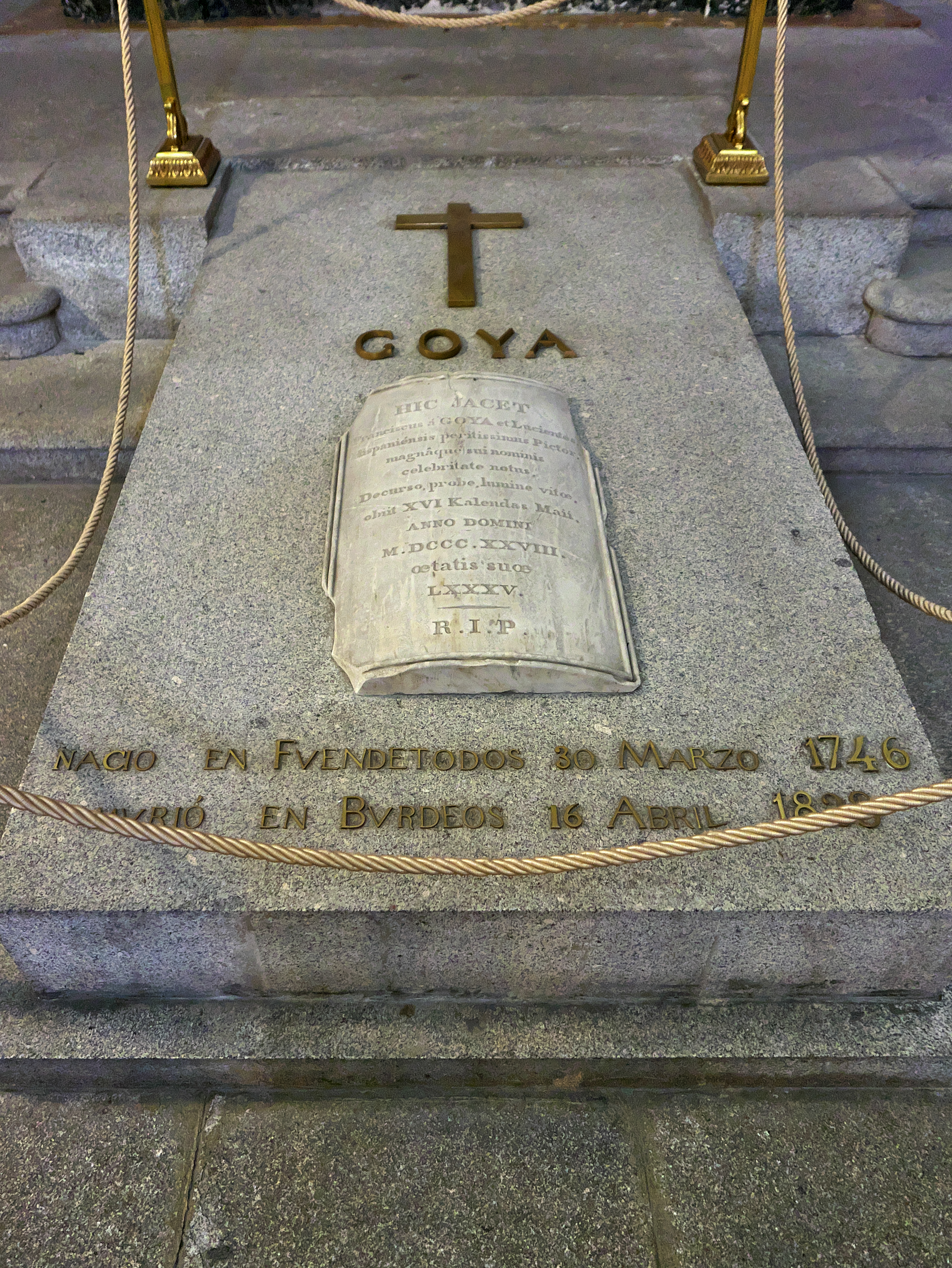 Ermita de San Antonio de la Florida, Madrid. Antonio Flórez Urdapilleta (1929), diseña una sencilla lápida de mármol para la tumba de Francisco de Goya.